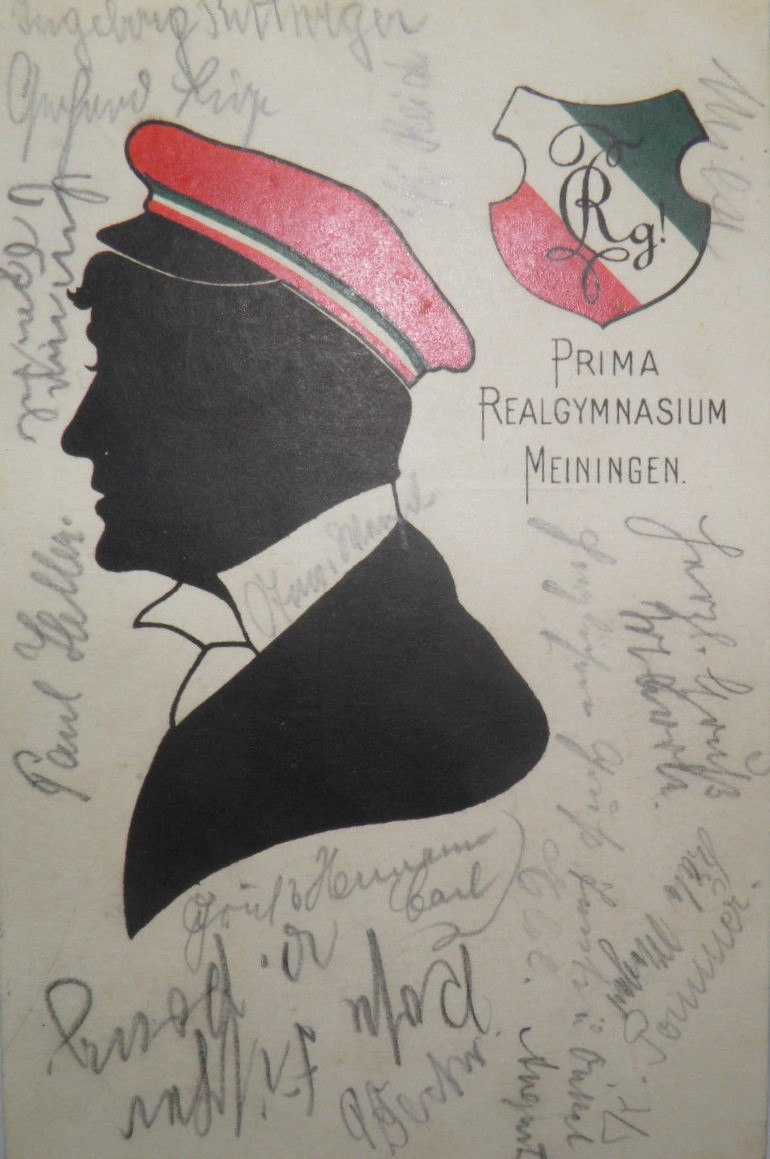 Für die Primaner (Abiturenten) des Realgymnasiums Meiningen erstellte Postkarte.